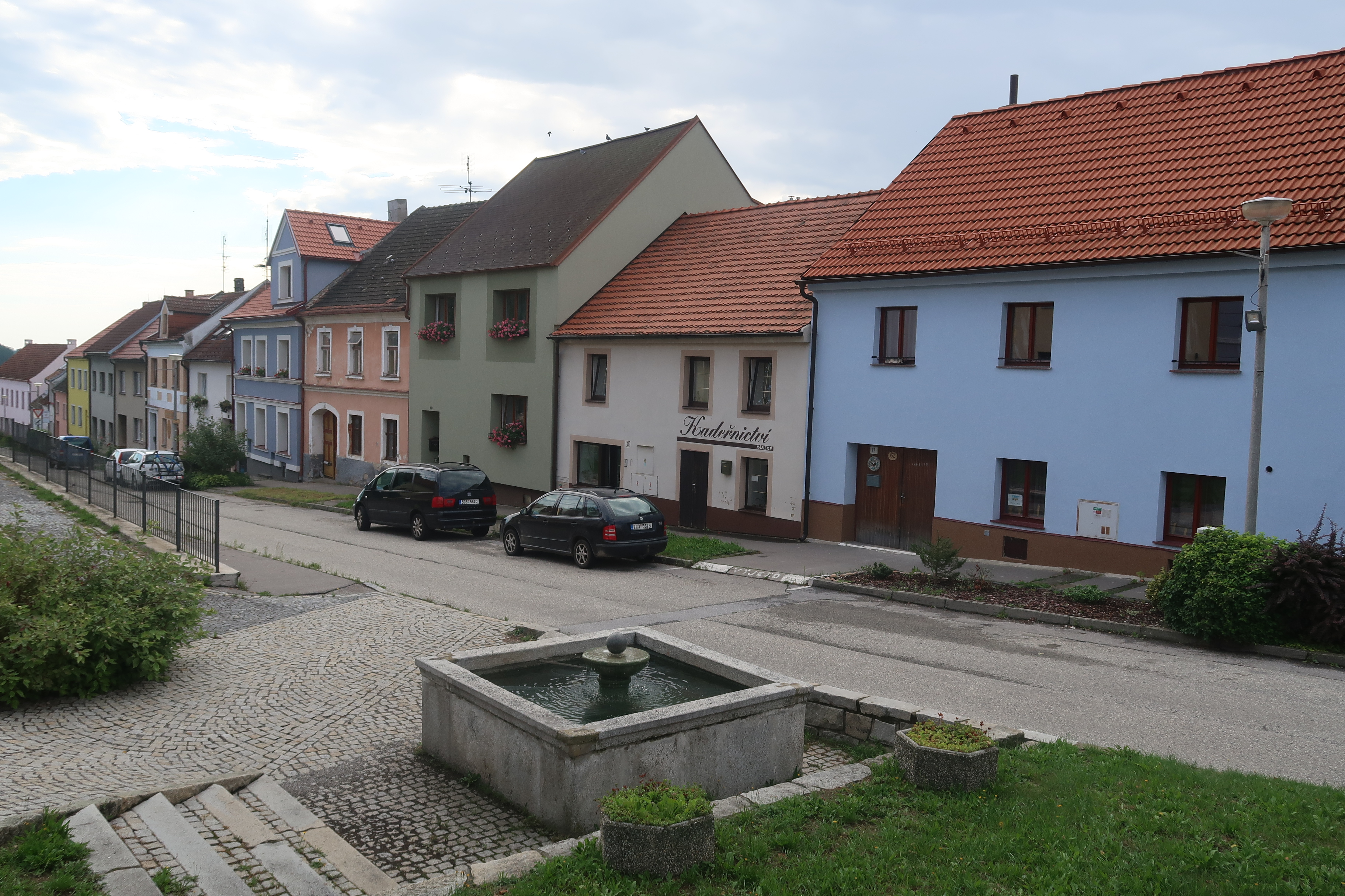 Kamarýtovo náměstí ve Velešíně, jižní část